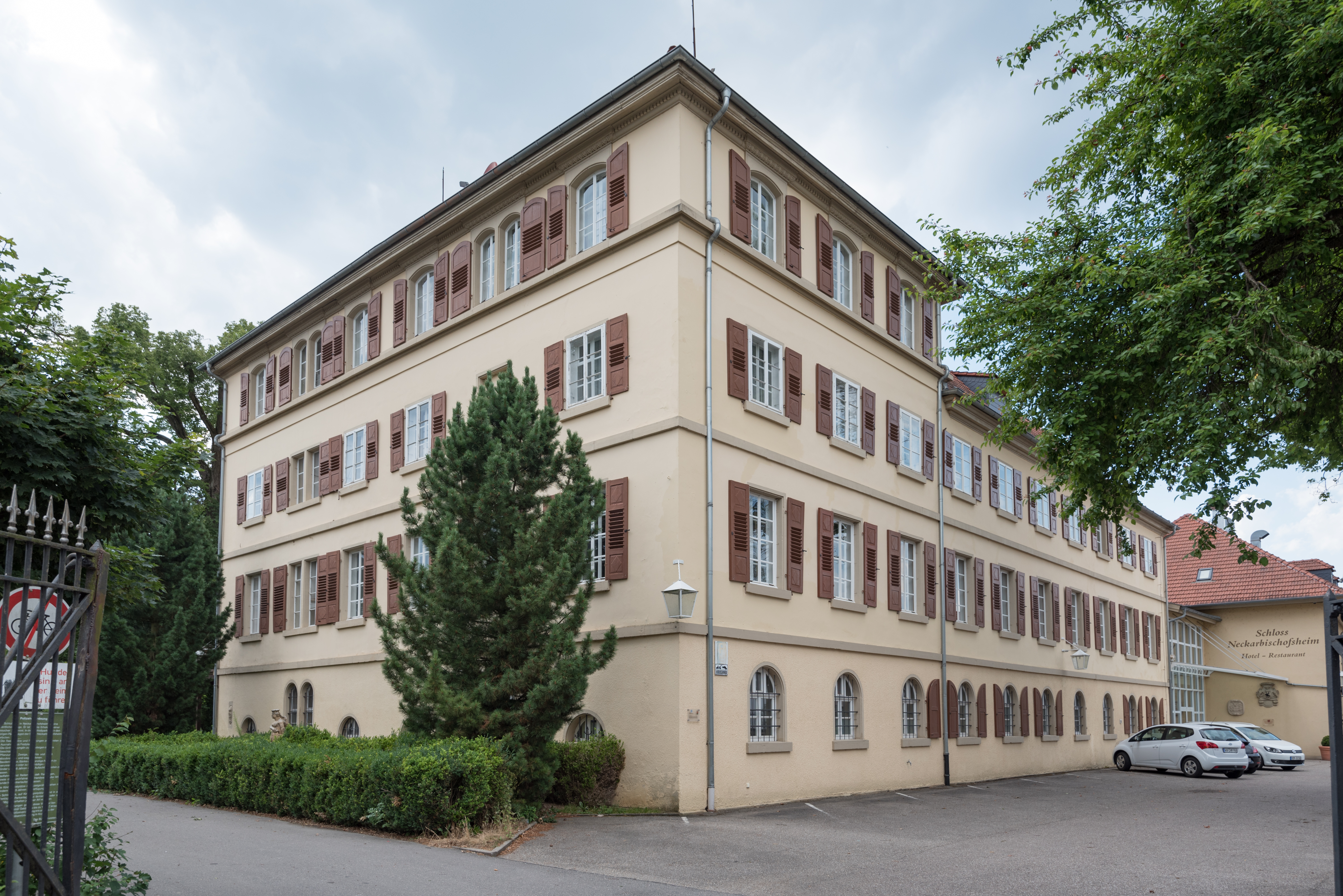 Neckarbischofsheim, Neues Schloss